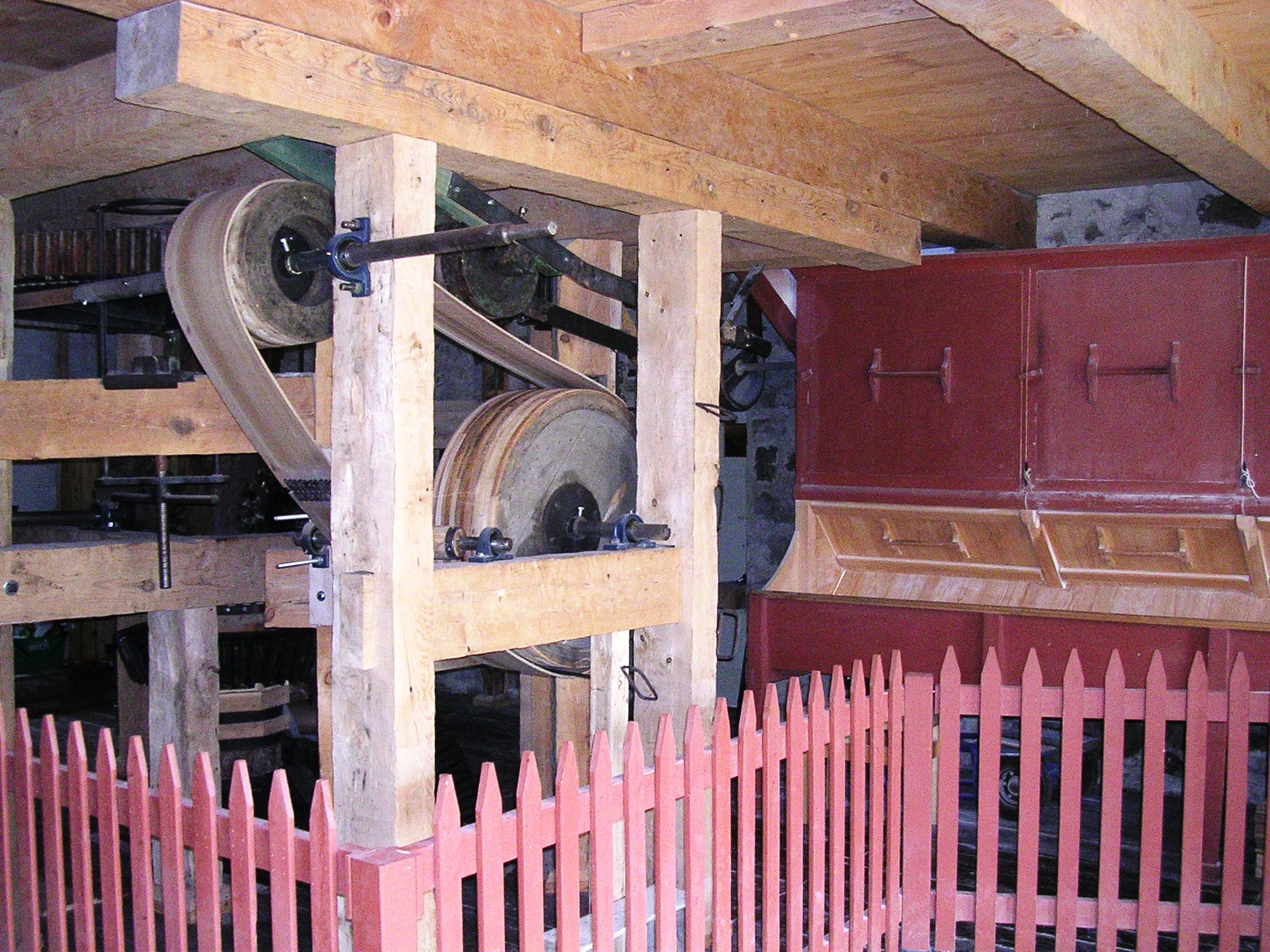 Mécanismes et bluteau du moulin de la Rémy à Baie-Saint-Paul (Québec); moulin à eau; moulin à farine